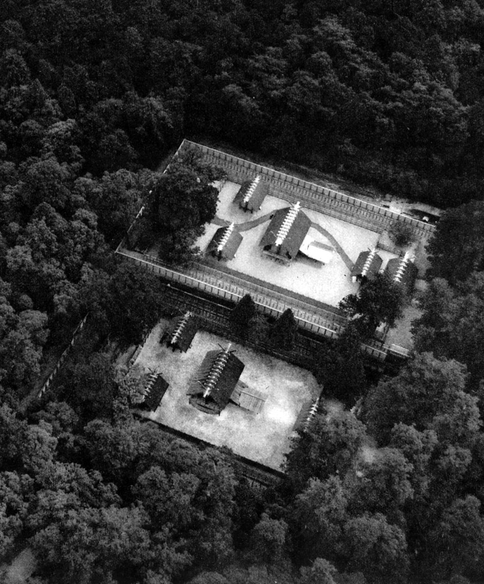 内宮(Naikū)新殿舎が完成した際の空撮写真。上が新殿舎、下が旧殿舎。